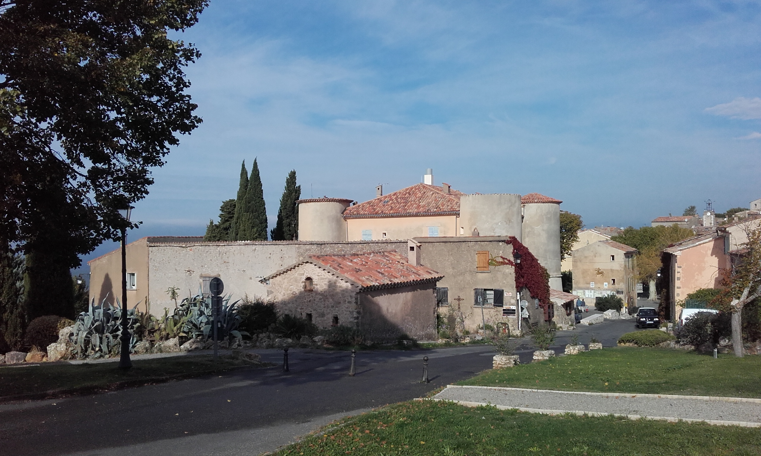 Var, Tourtour, Vue sur le village depuis l'église. L'antenne de téléphonie mobile est malheureusement particulièrement inesthétique.